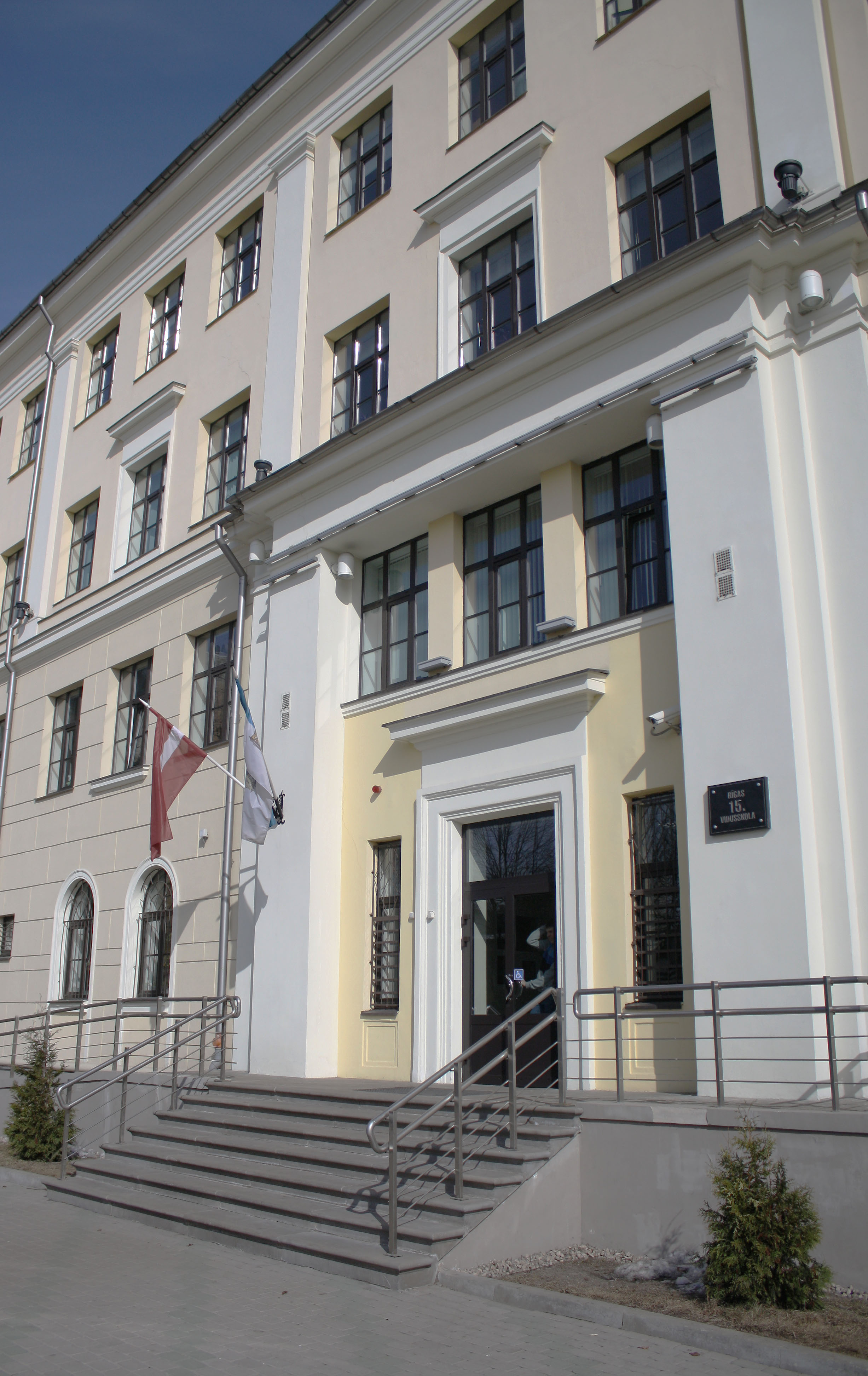 Рига (Латвия) Средняя школа №15 - парадный вход